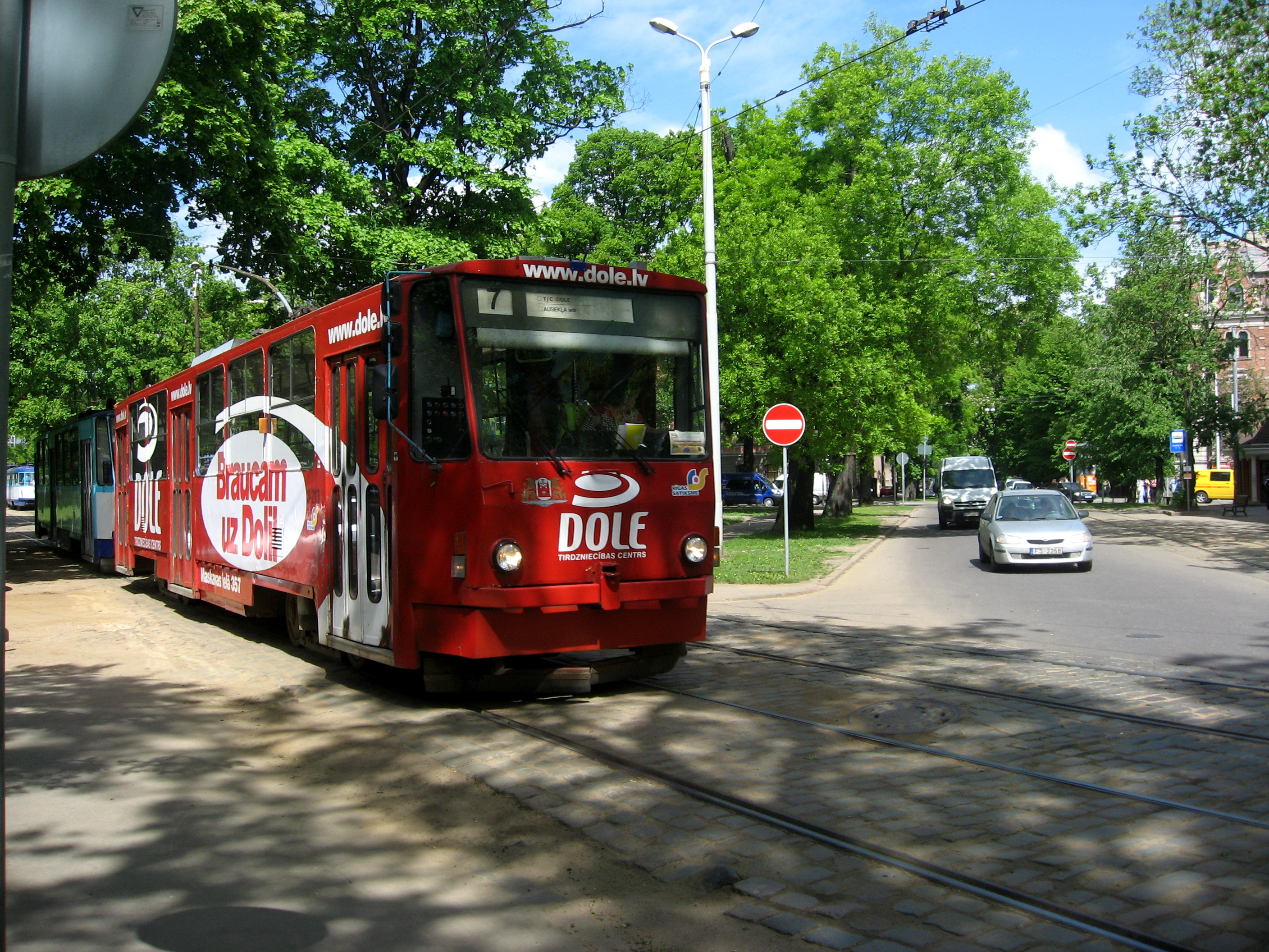 Riga, tramvaj na lince č. 7